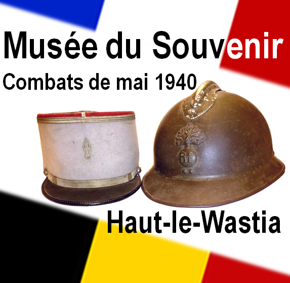 Logo du musée